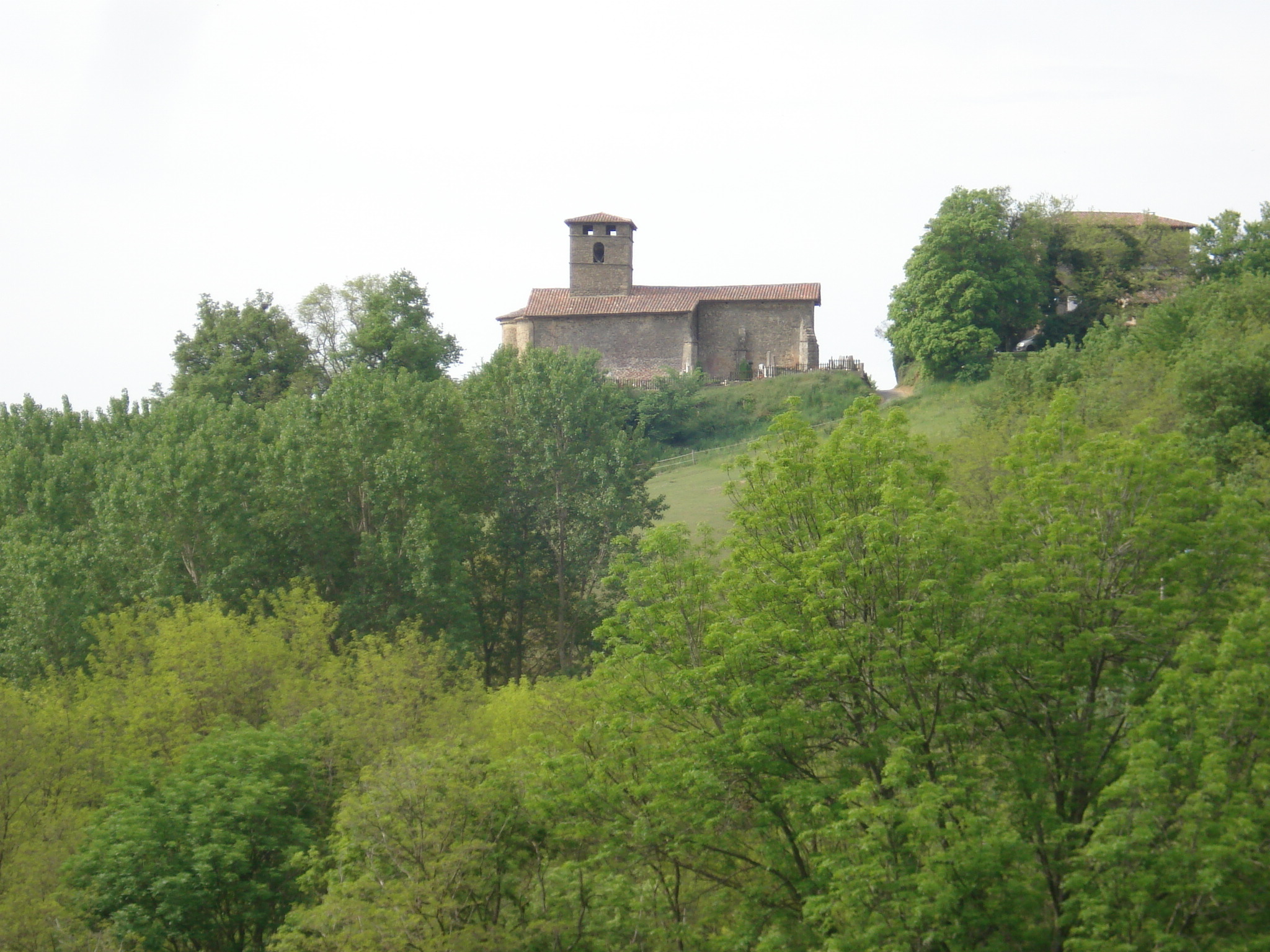 vue de l'église de Bathernay Drôme